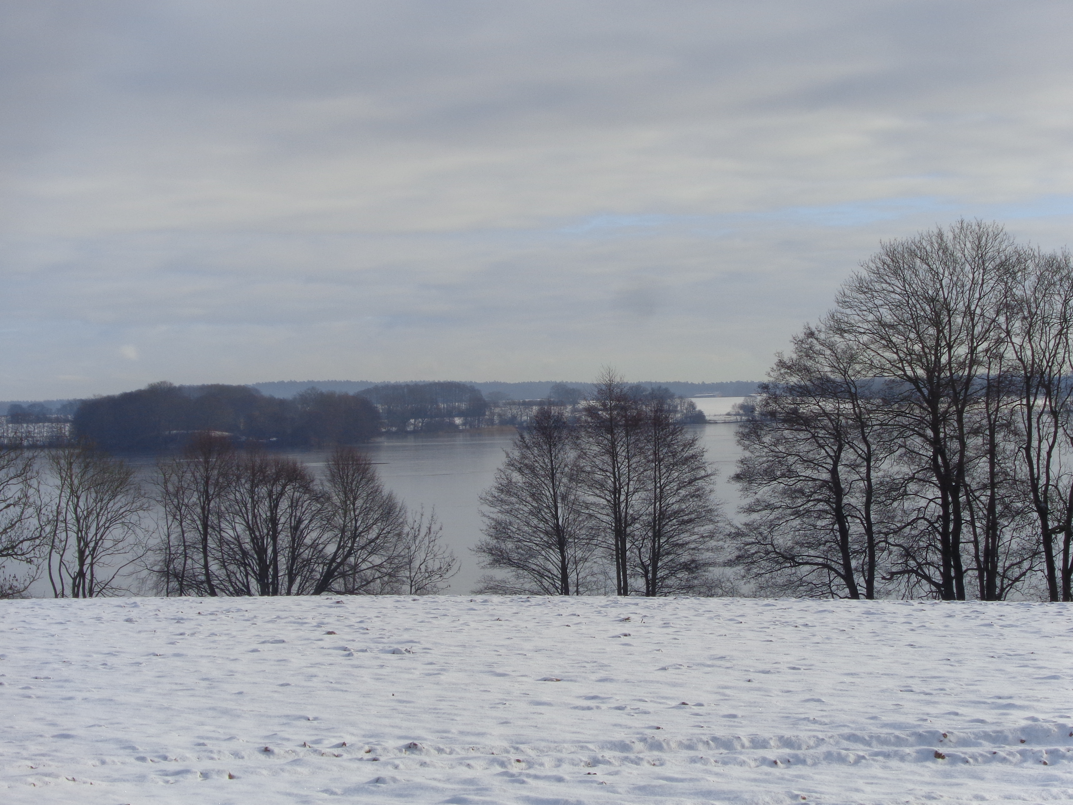 Blick von Westen auf den Krakower Obersee, zwischen Bussow und Möllen